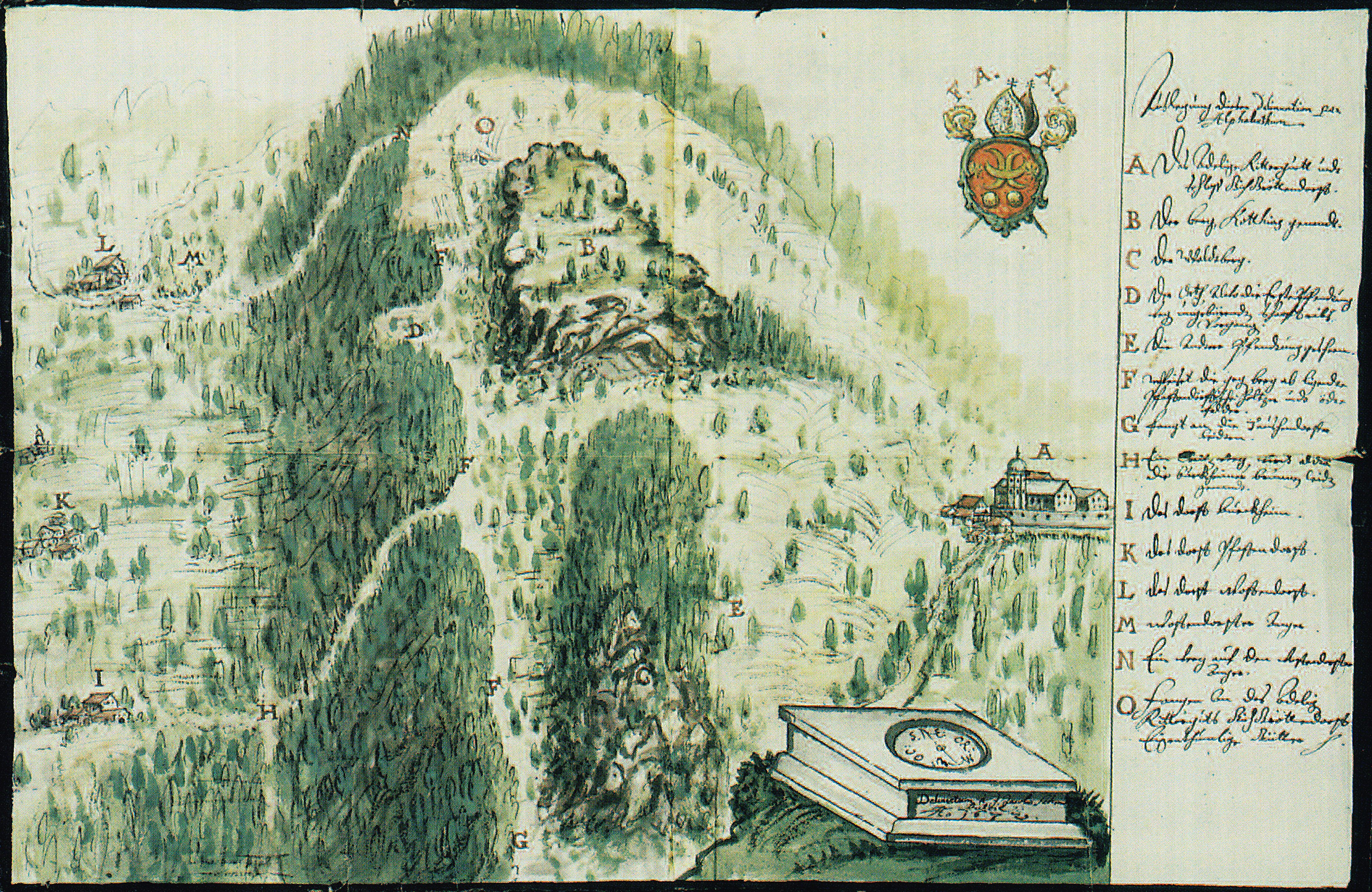 Älteste bekannte Karte des Kordigastes. Erstellt anlässlich eines strittigen Schaftriebes bei Giechkröttendorf. Die in der Karte enthaltene Legende: A: Das ummauerte Schlossgut Giechkröttendorf B: Das felsig-kahle Plateau des Großen Kordigastes C: Der als Waldberg bezeichnete kleine Kordigast D: Weidestelle der konfistierten Schafsherde E: Andere " F: Die vom Kloster Langheim beanspruchten Waldhänge am Kordigast G: ? H: Wegnschneiße nach Burkheim I: Burkheim K: Pfaffendorf L: Woffendorf M: ? N: Wegschneiße nach Woffendorf O: Weidefläche